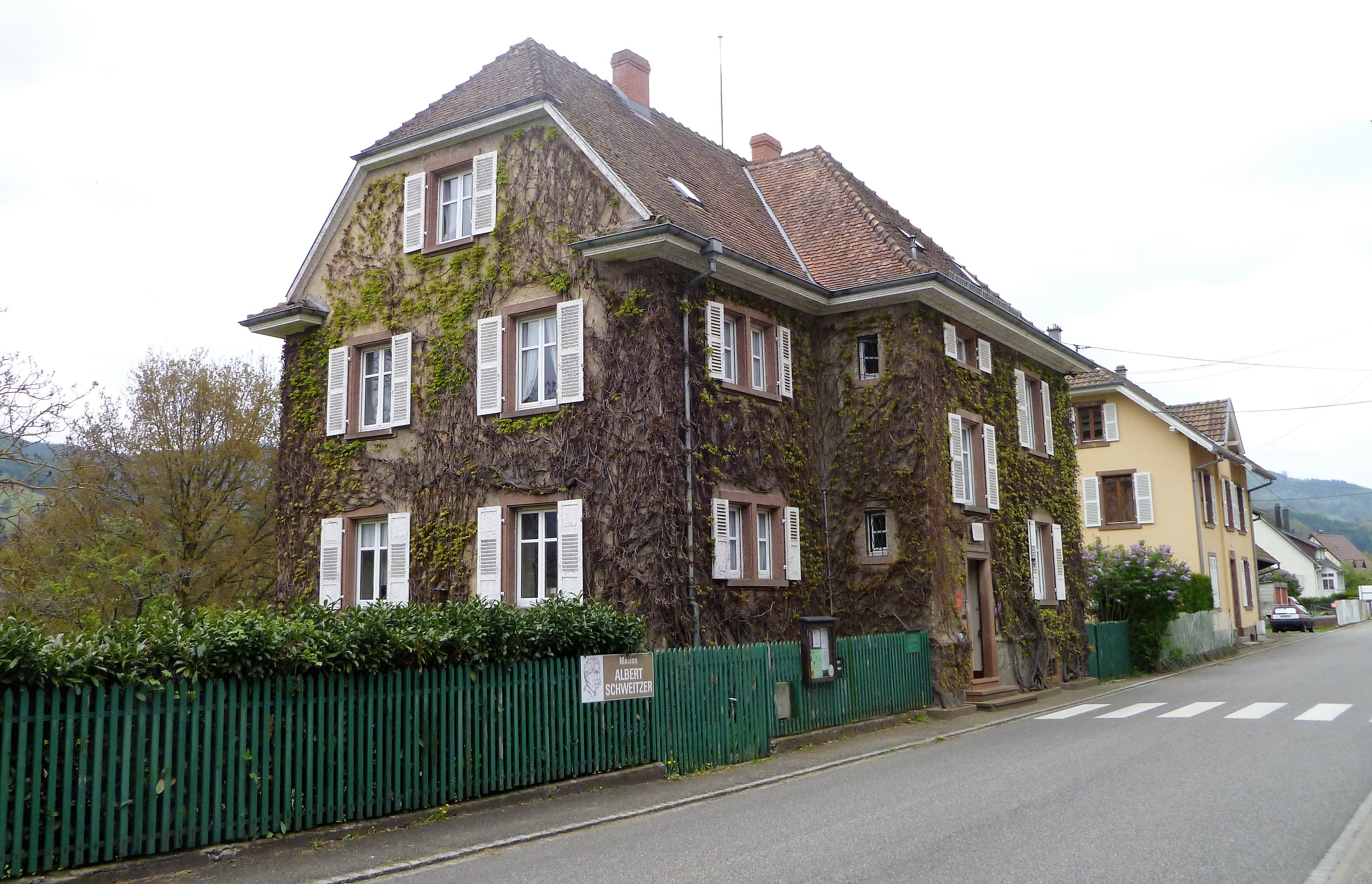 in Gunsbach